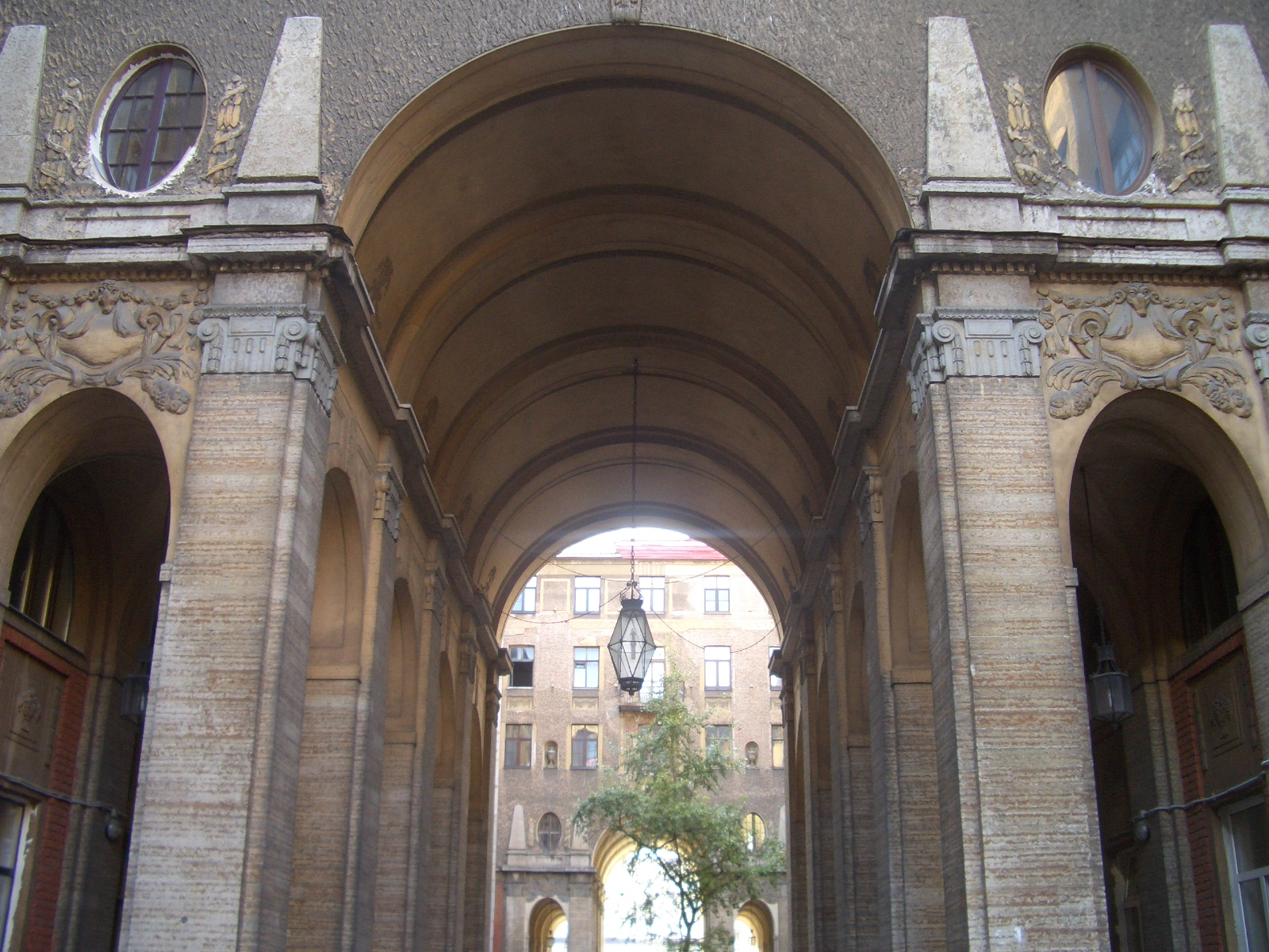 Доходный дом Толстого